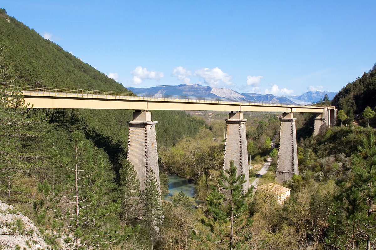 Le viaduc du Claps à Luc-en-Diois (Drôme) ; Ligne de Livron à Aspres-sur-Buëch